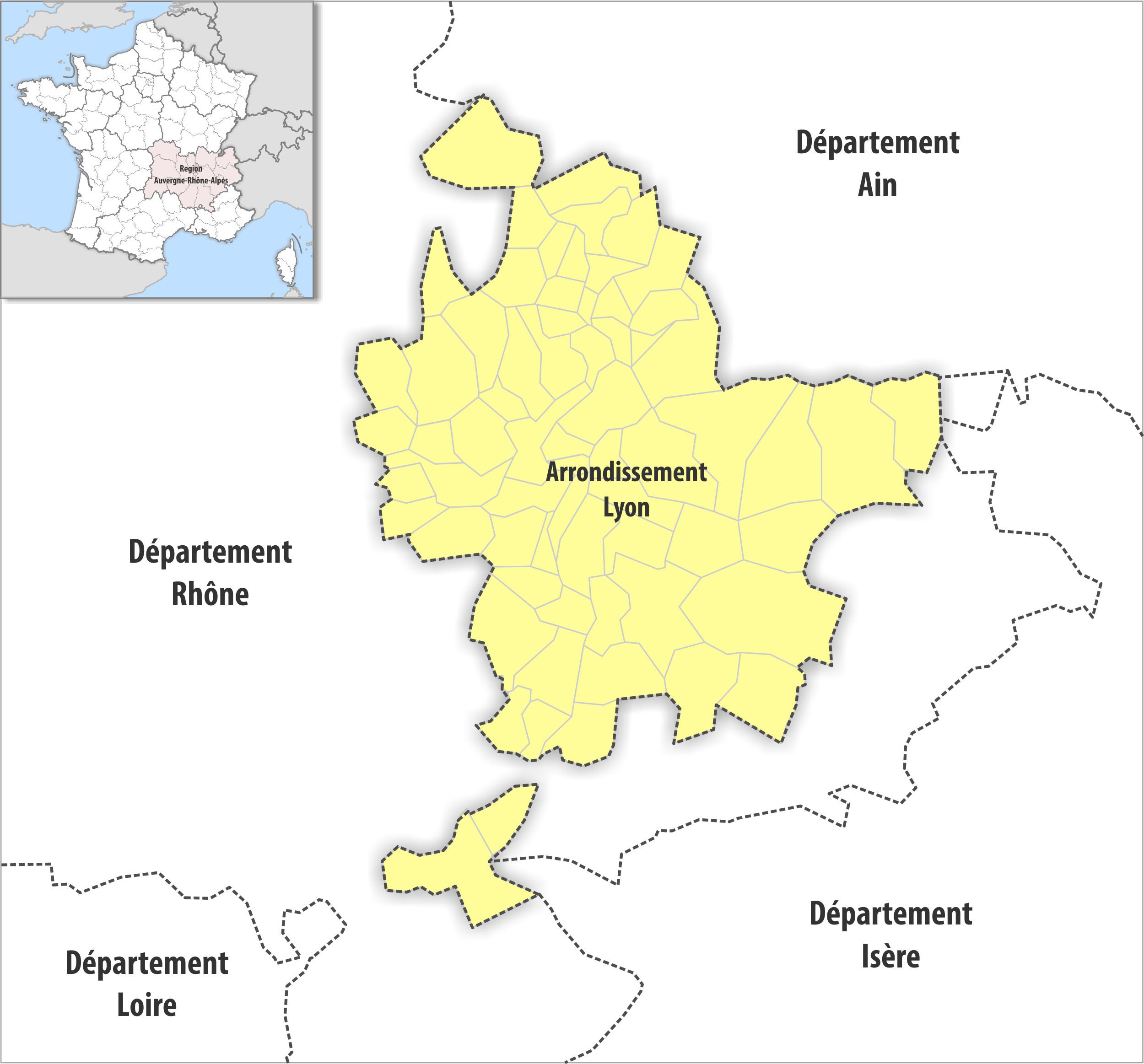 Gemeinden und Arrondissemente im Departement Métropole_de_Lyon